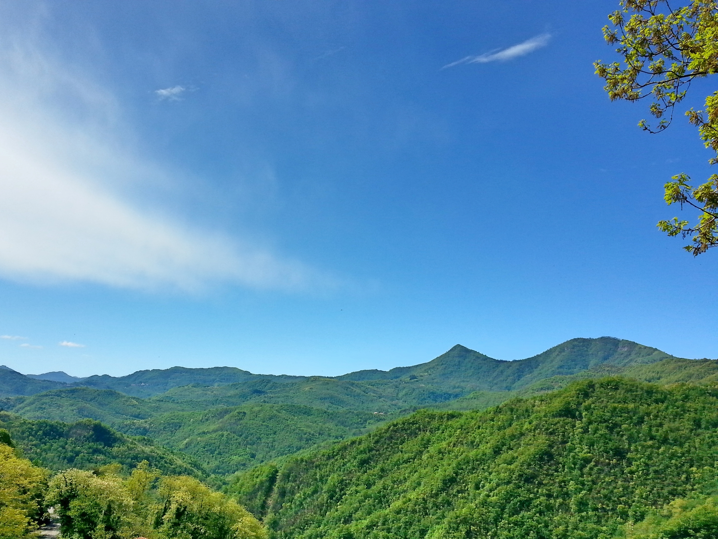 I monti Croce dei Fo' e Bado a destra visti dalla strada dell'Incisa di Boasi